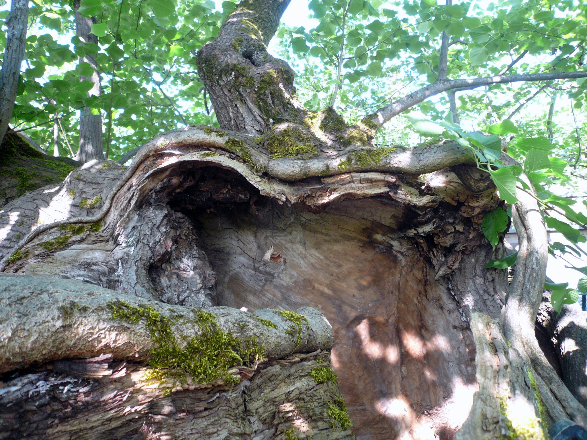 Tanzlinde in Effeltrich